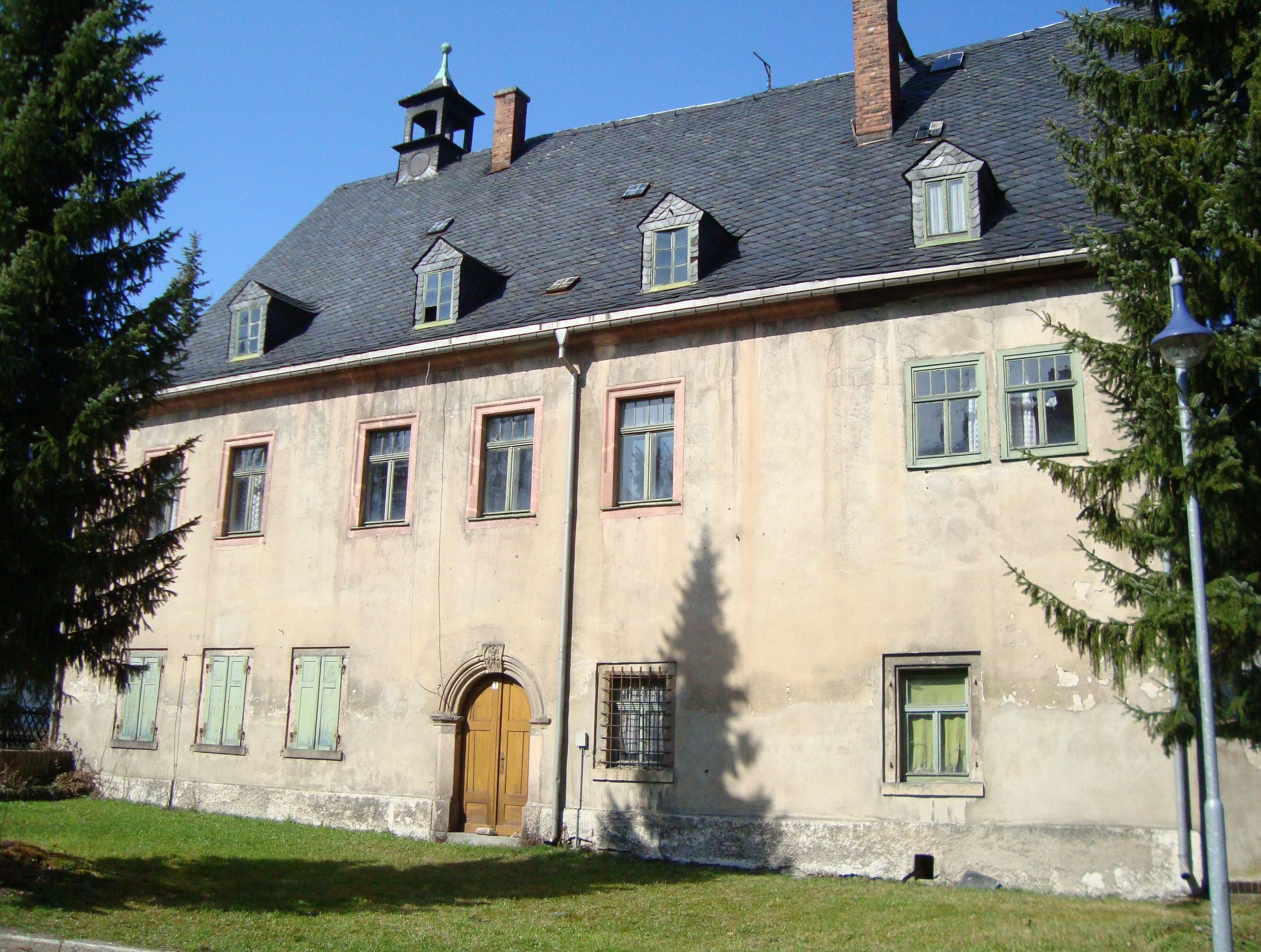 Hammerherrenhaus in Wolfsgrün im Erzgebirge